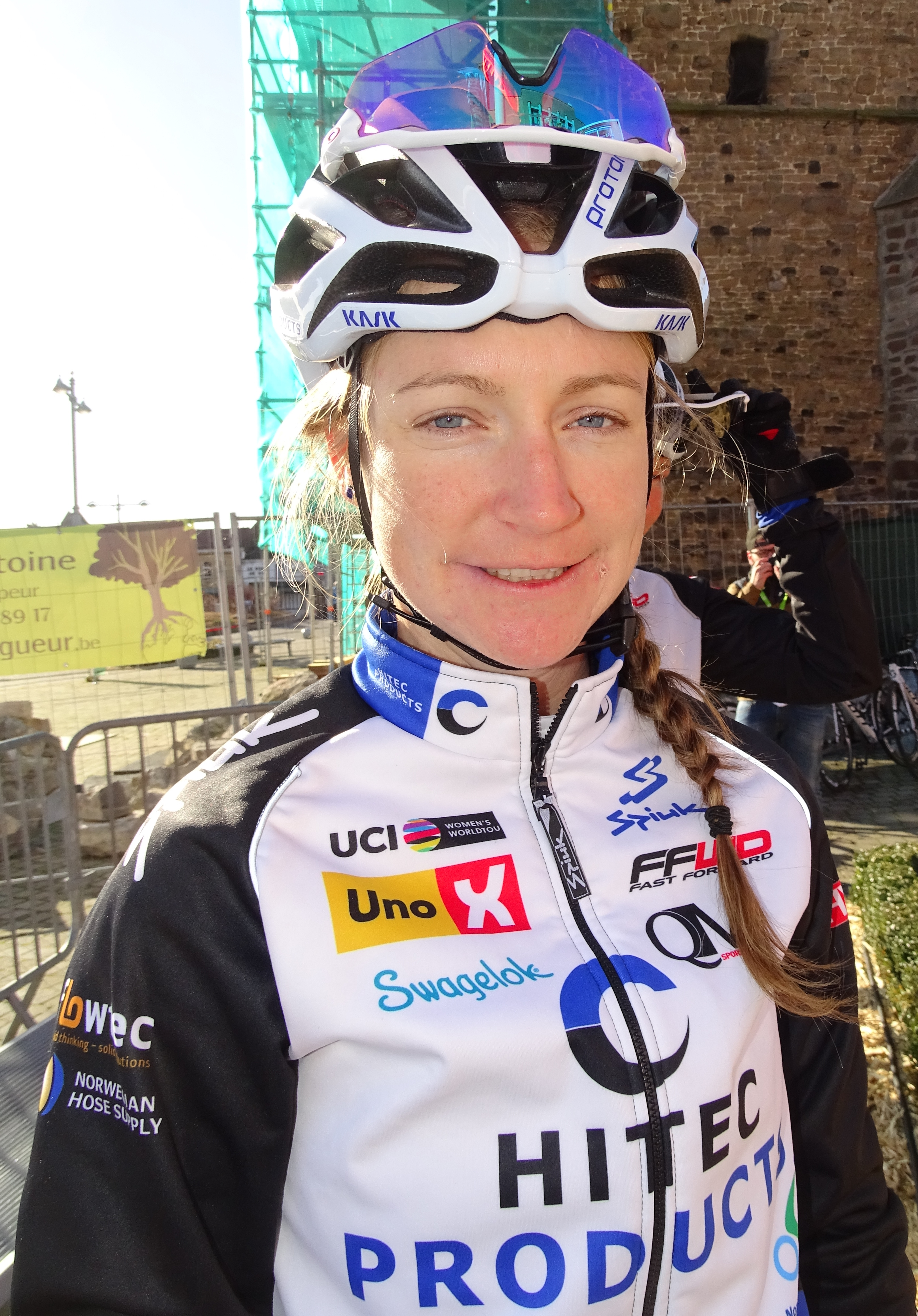 Reportage réalisé le mercredi 2 mars à l'occasion du départ du Samyn des Dames 2016 et du Samyn 2016 à Quaregnon, Belgique.